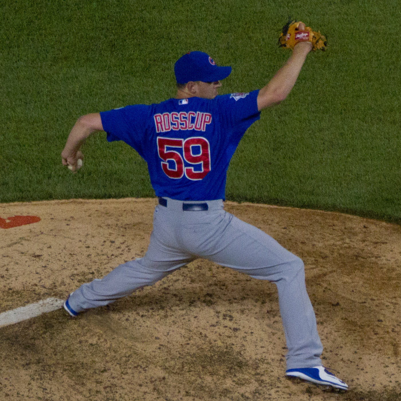 Zac Rosscup